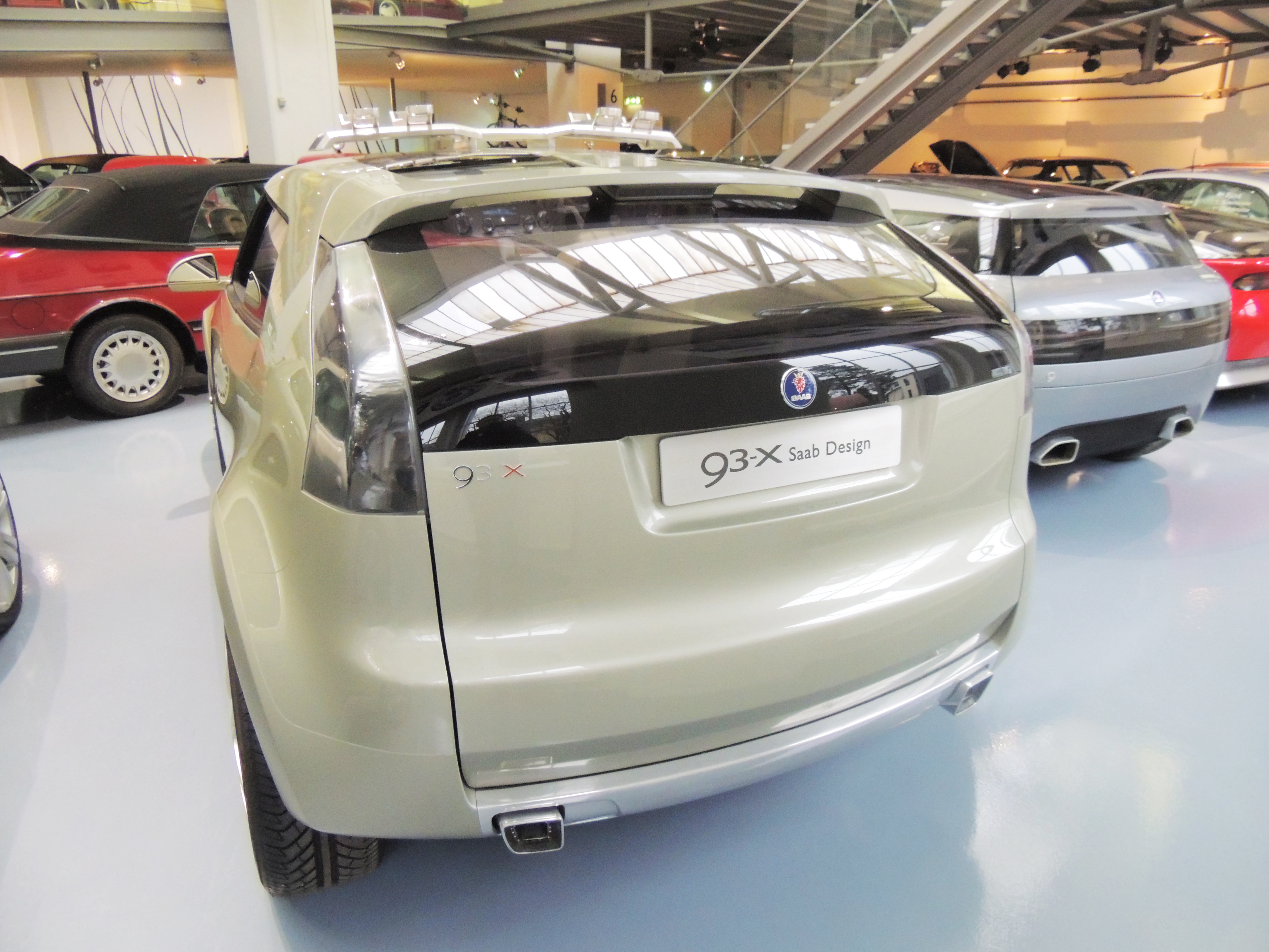 Tył 93-X